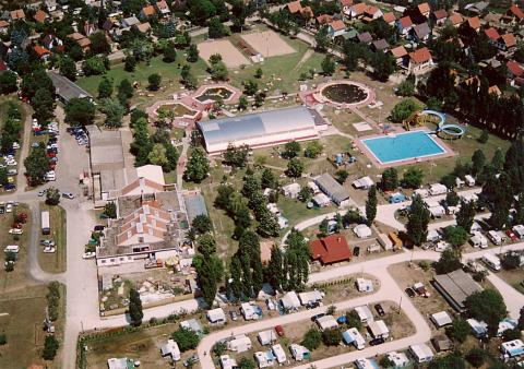 Tiszakécske, Hungary, aerialphotography